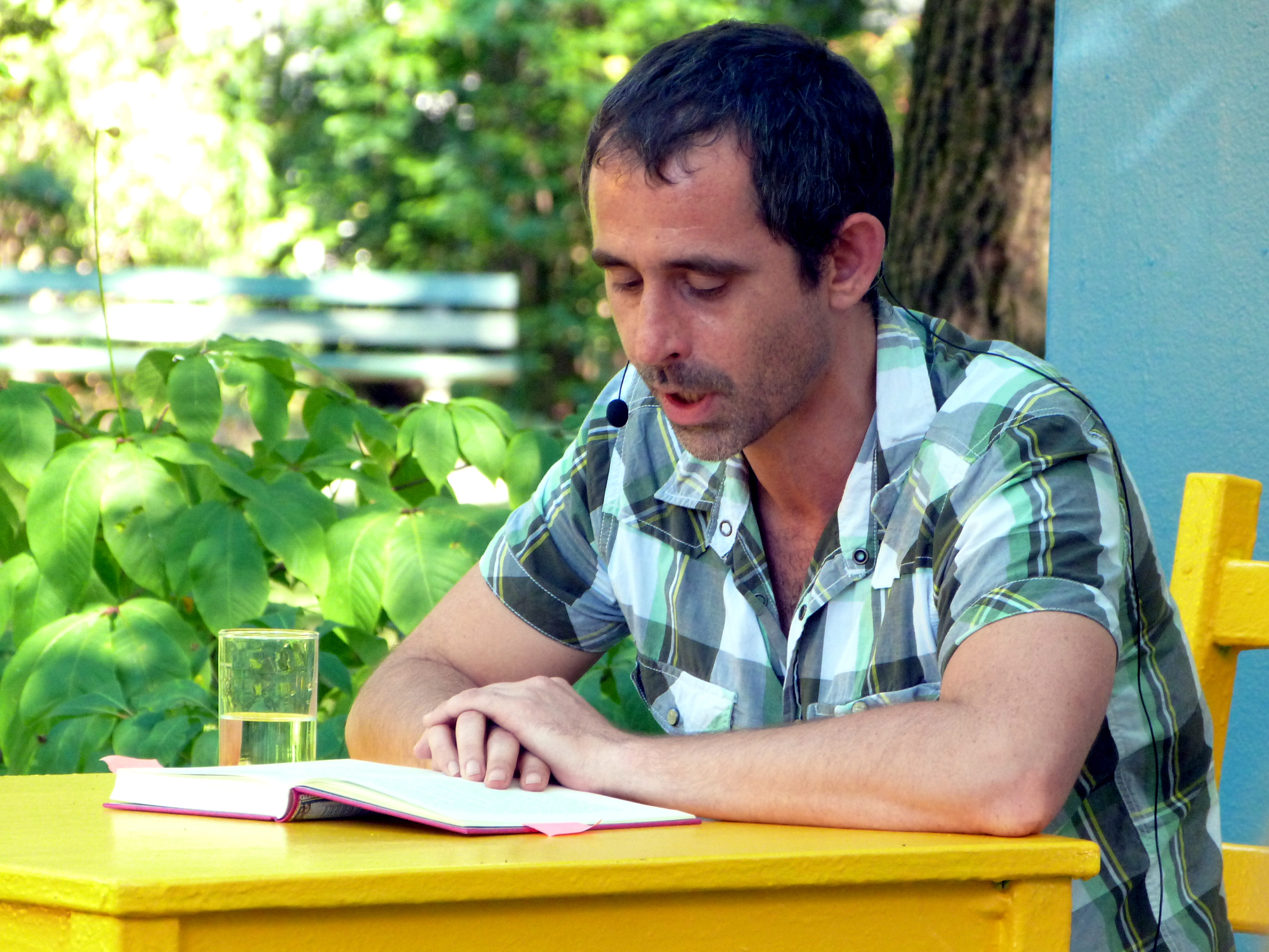 Der Schriftsteller Mario Fesler bei einer Lesung auf dem Erlanger Poetenfest 2016.